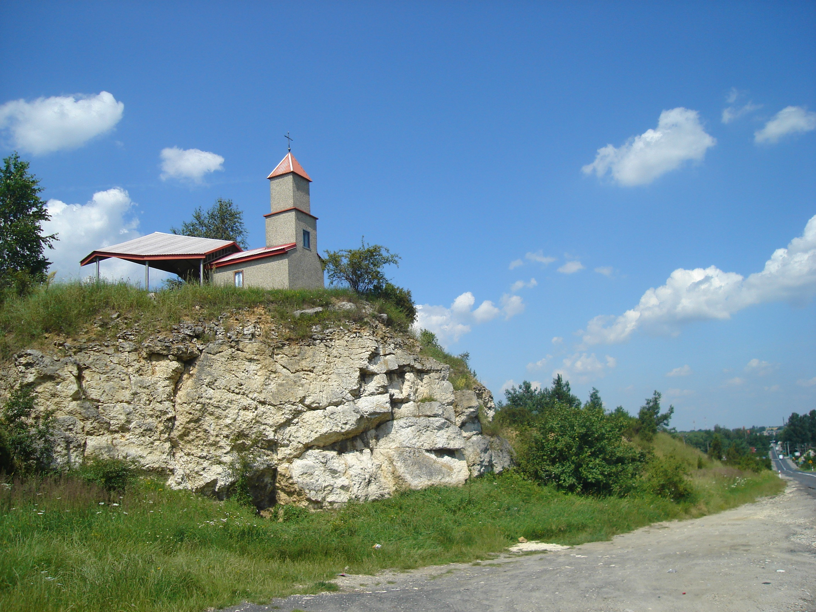 Kapliczka w okolicy Działoszyna - Raciszyn